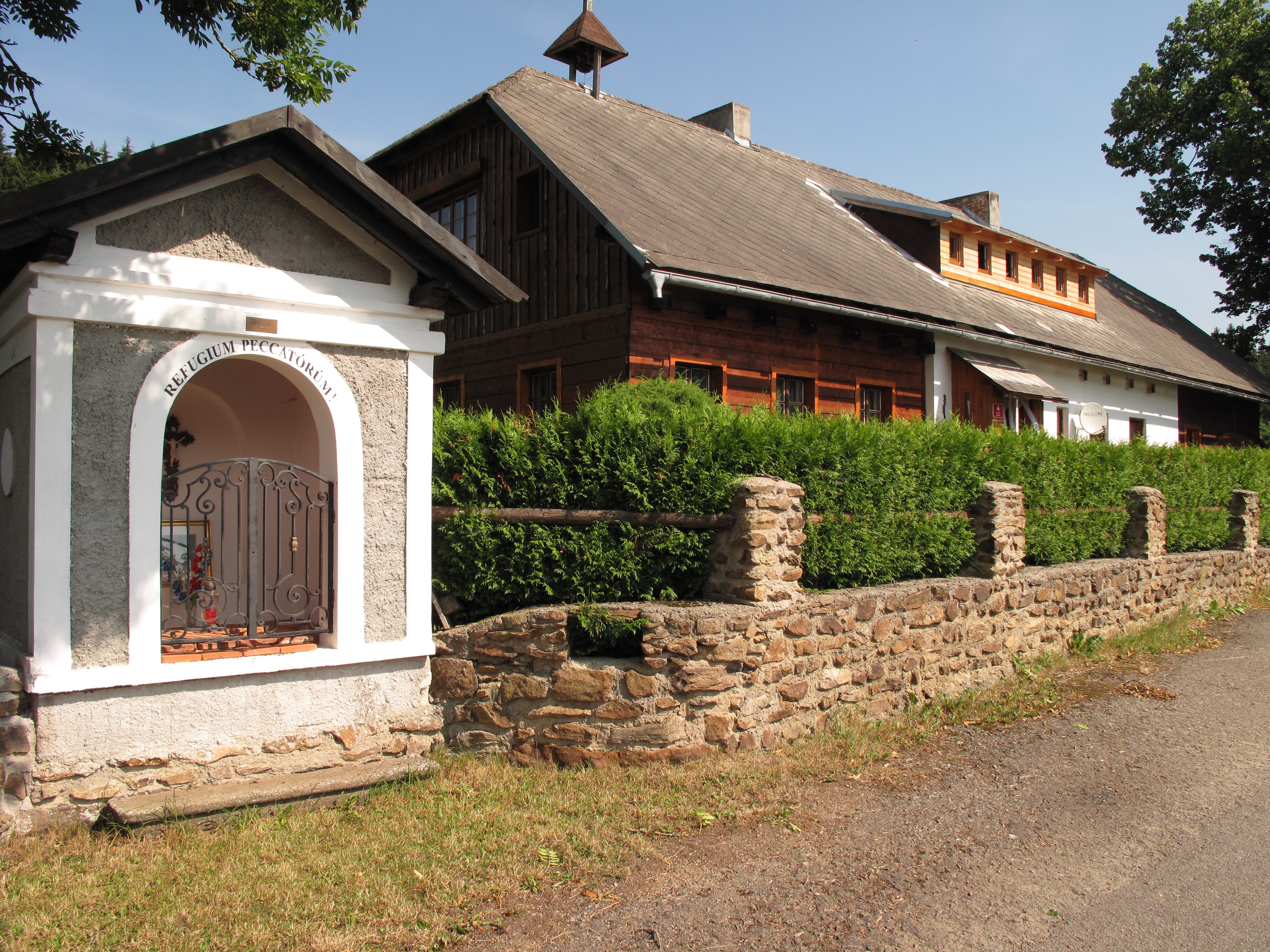 Kaplička Panny Marie v Kaplici. Okres Prachatice, Česká republika.